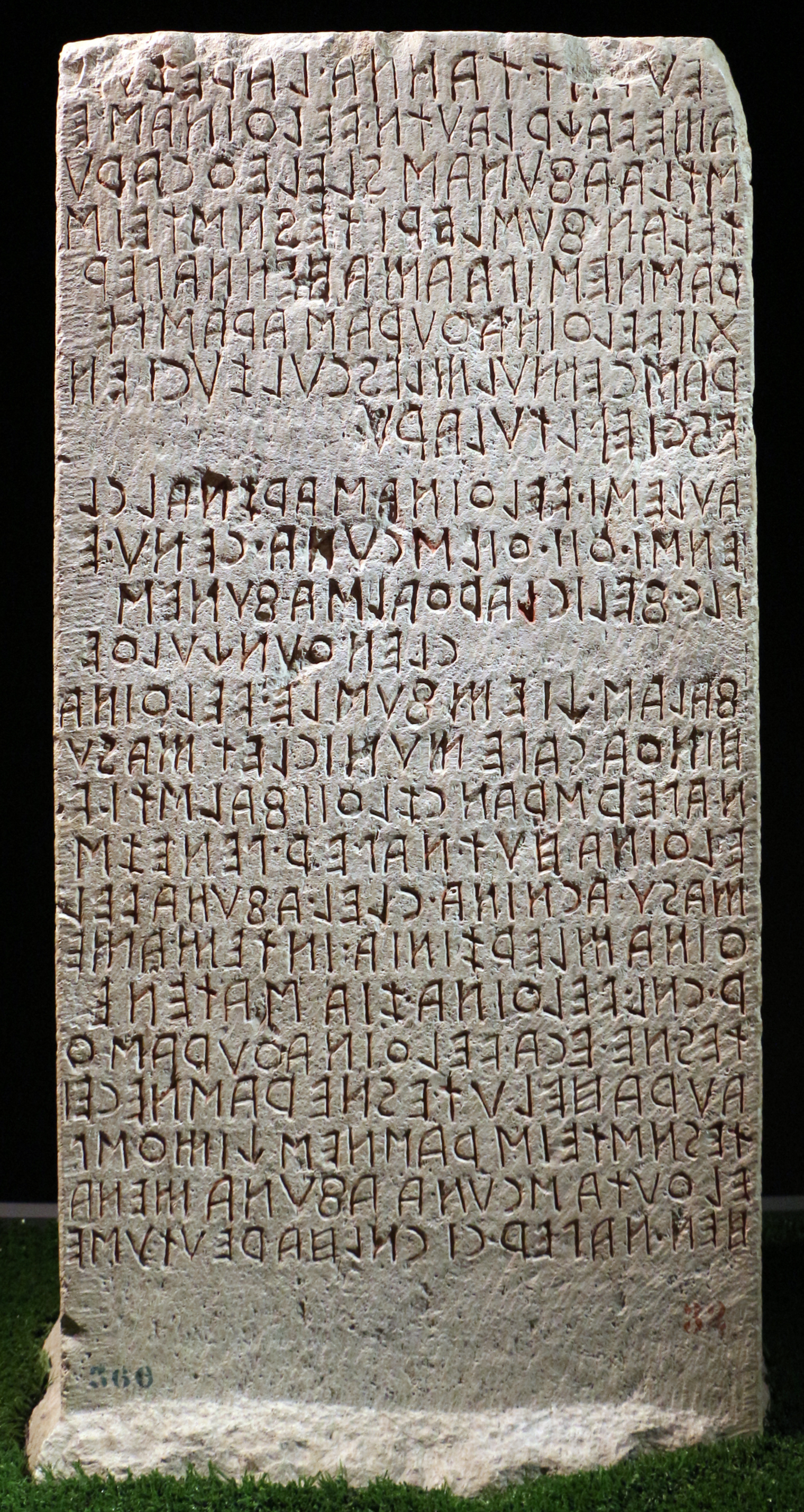 Museo Archeologico Nazionale dell'Umbria This is a photo of a monument which is part of cultural heritage of Italy.